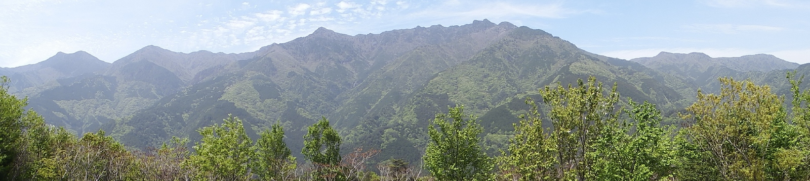 ゆらぎの森から見る赤石山系